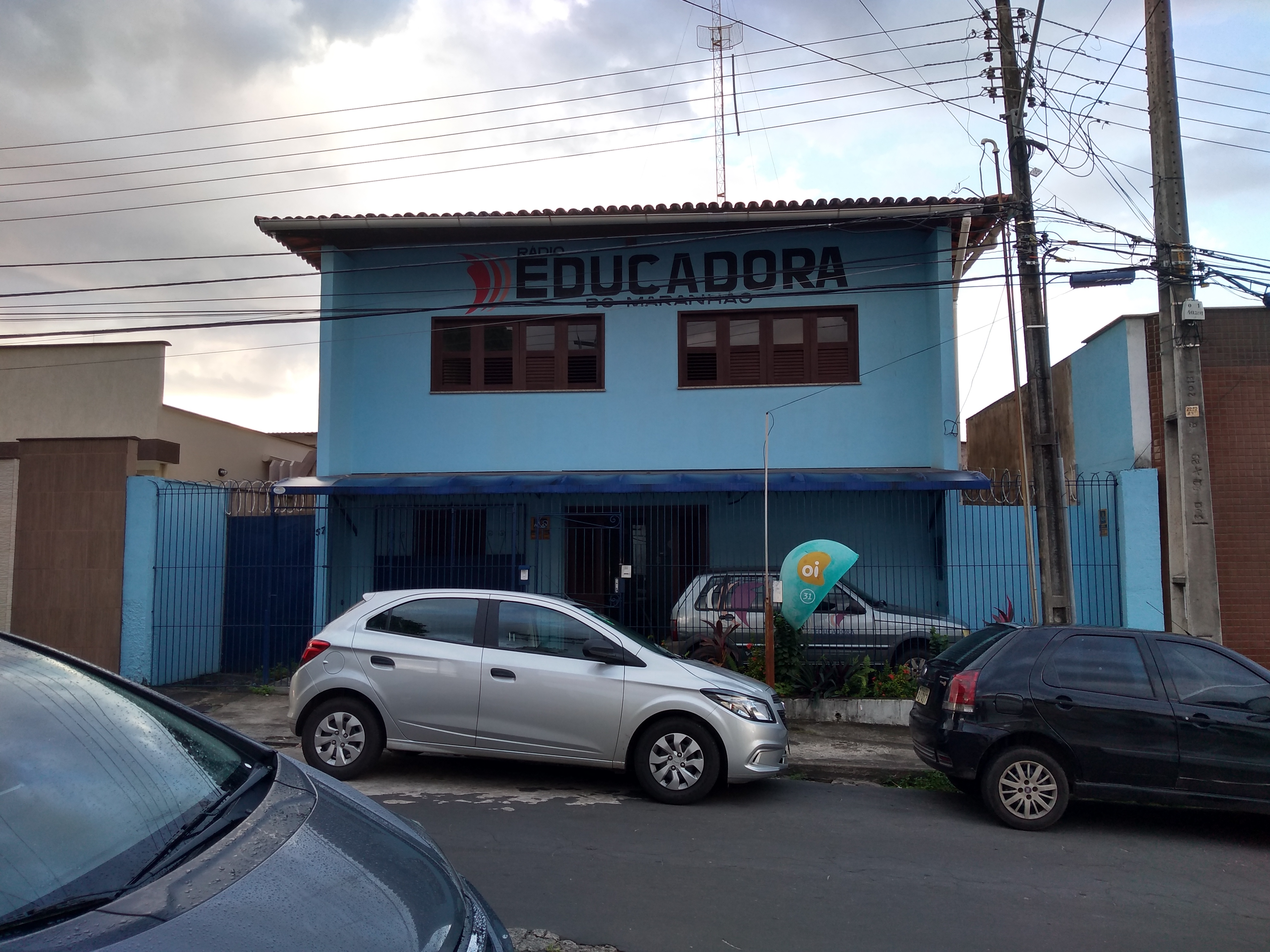 Sede da Rádio Educadora, emissora de rádio sediada em São Luís, MA - Brasil